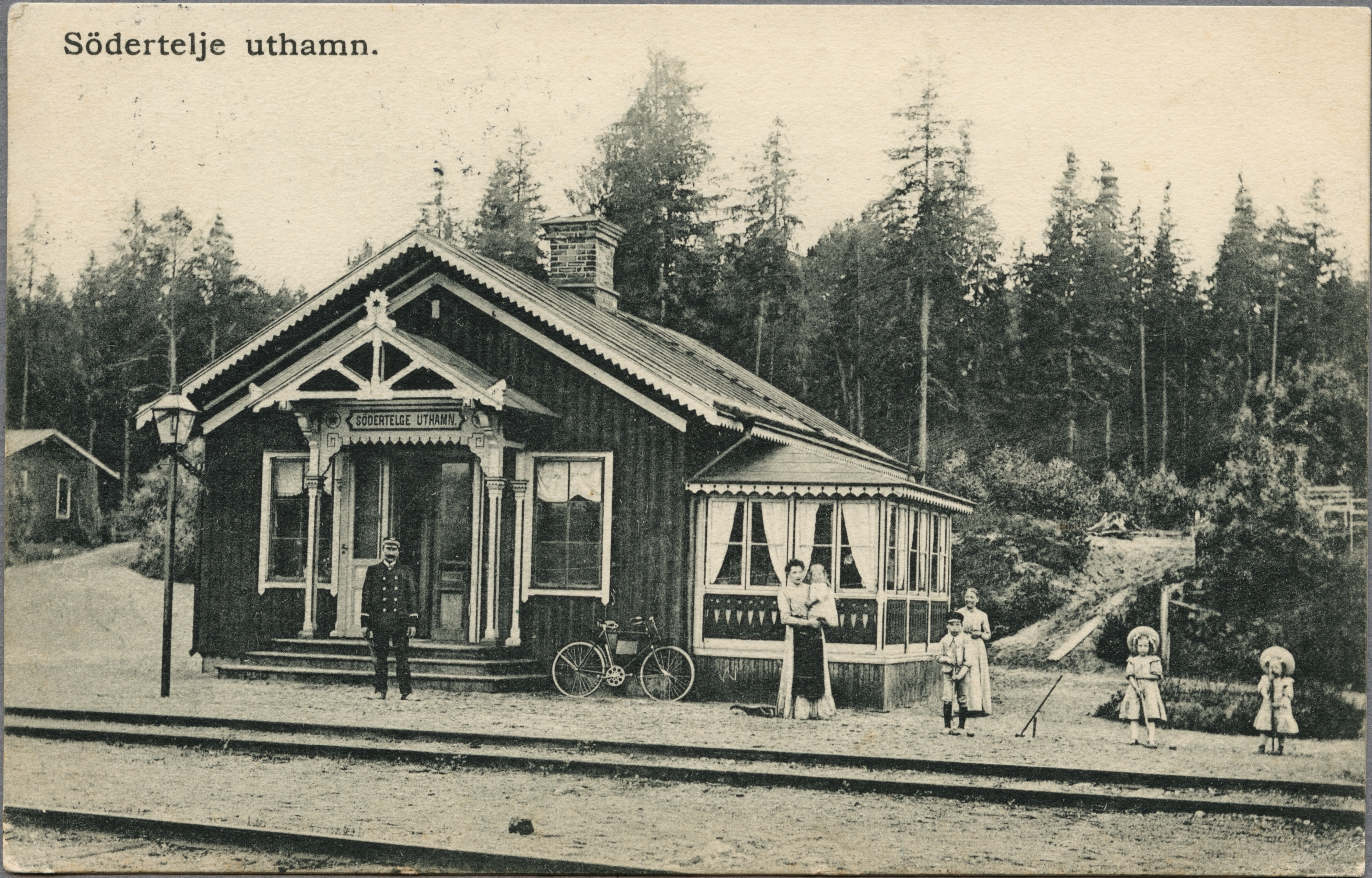 Södertelge uthamn station gruppfoto med spår 1905. Södertälje, Södermanland